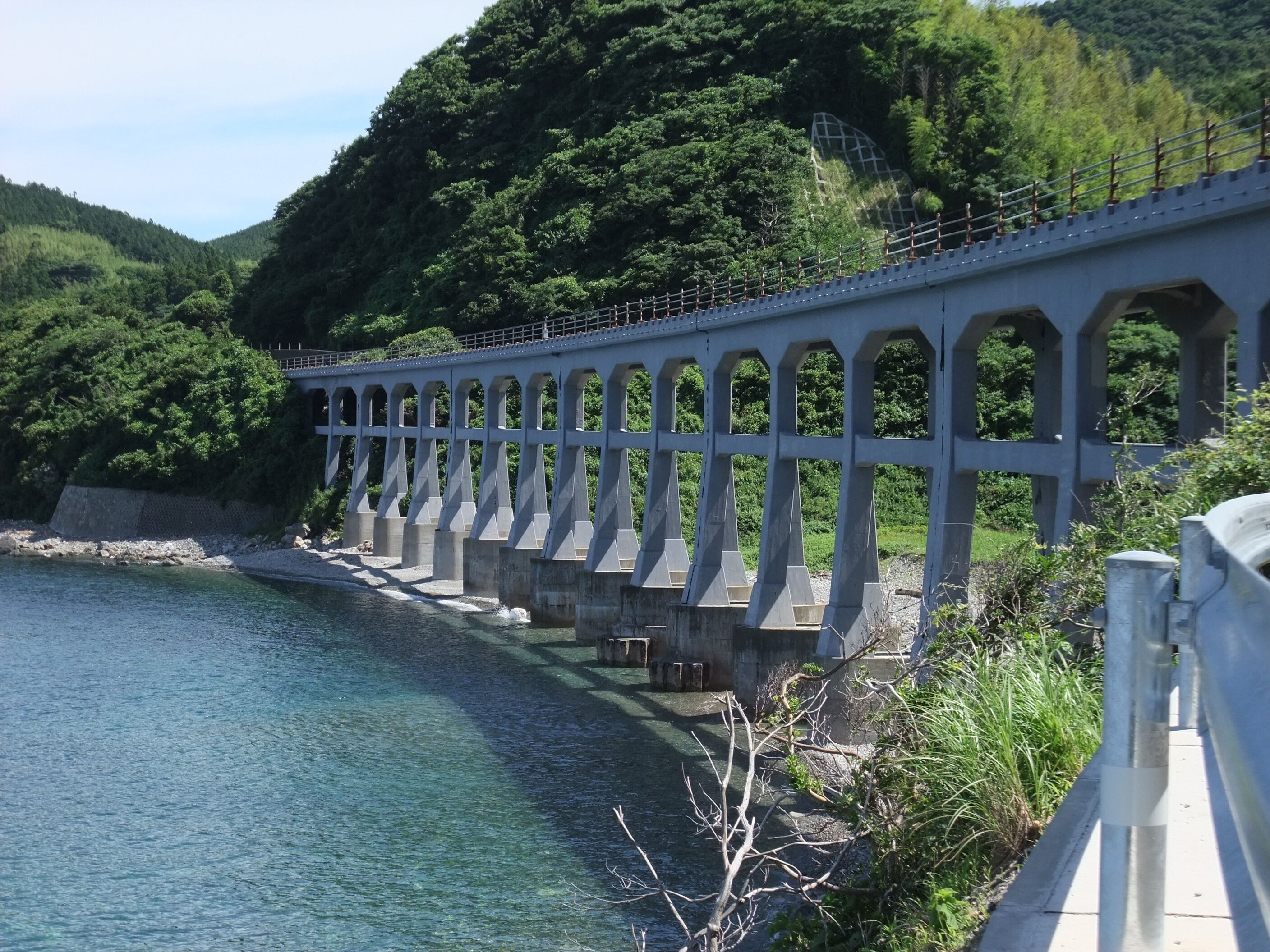 JR西日本山陰本線の惣郷川橋梁